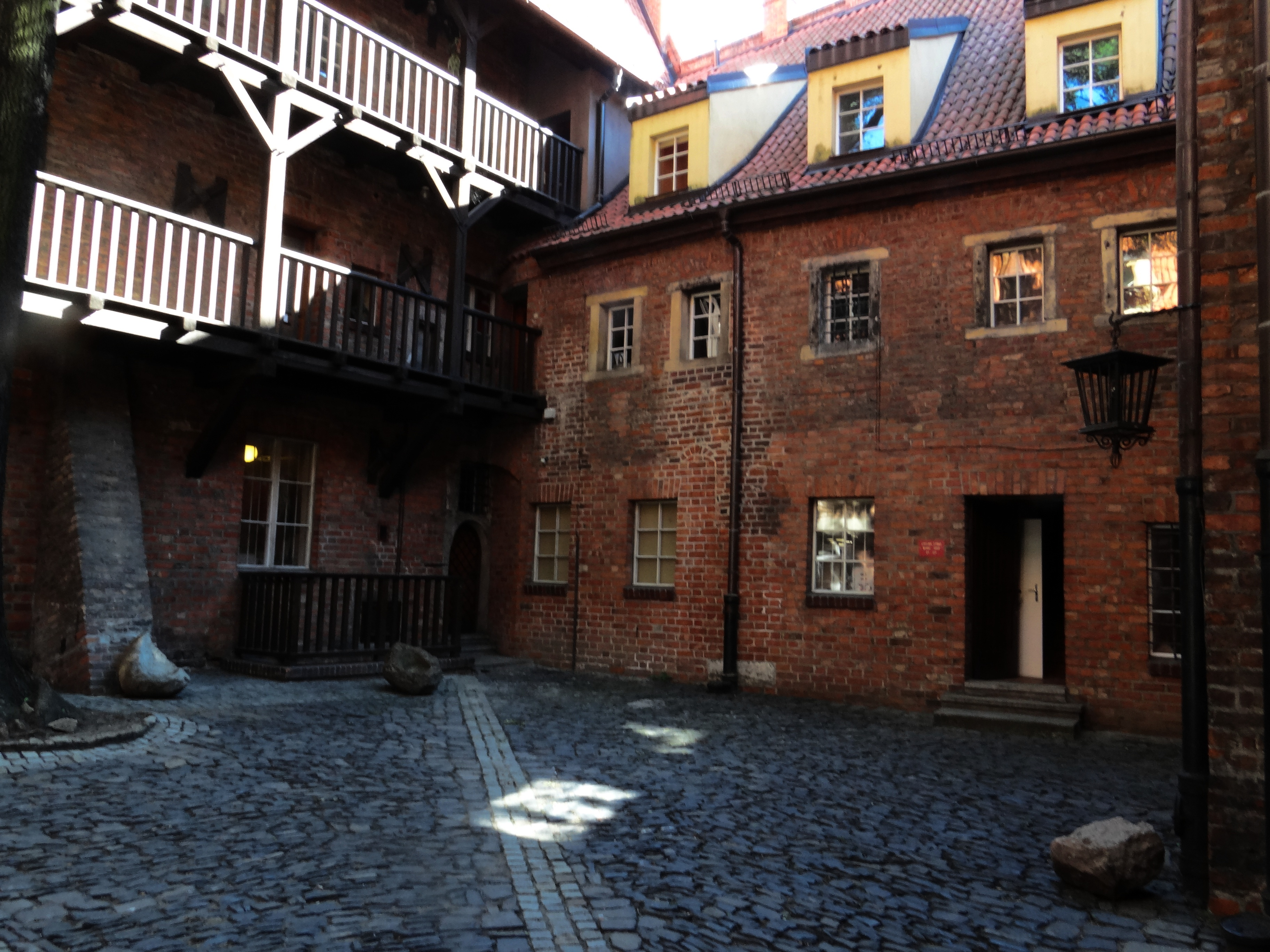 Wrocław, dawne więzienie miejskie przy ul. Więziennej, XV